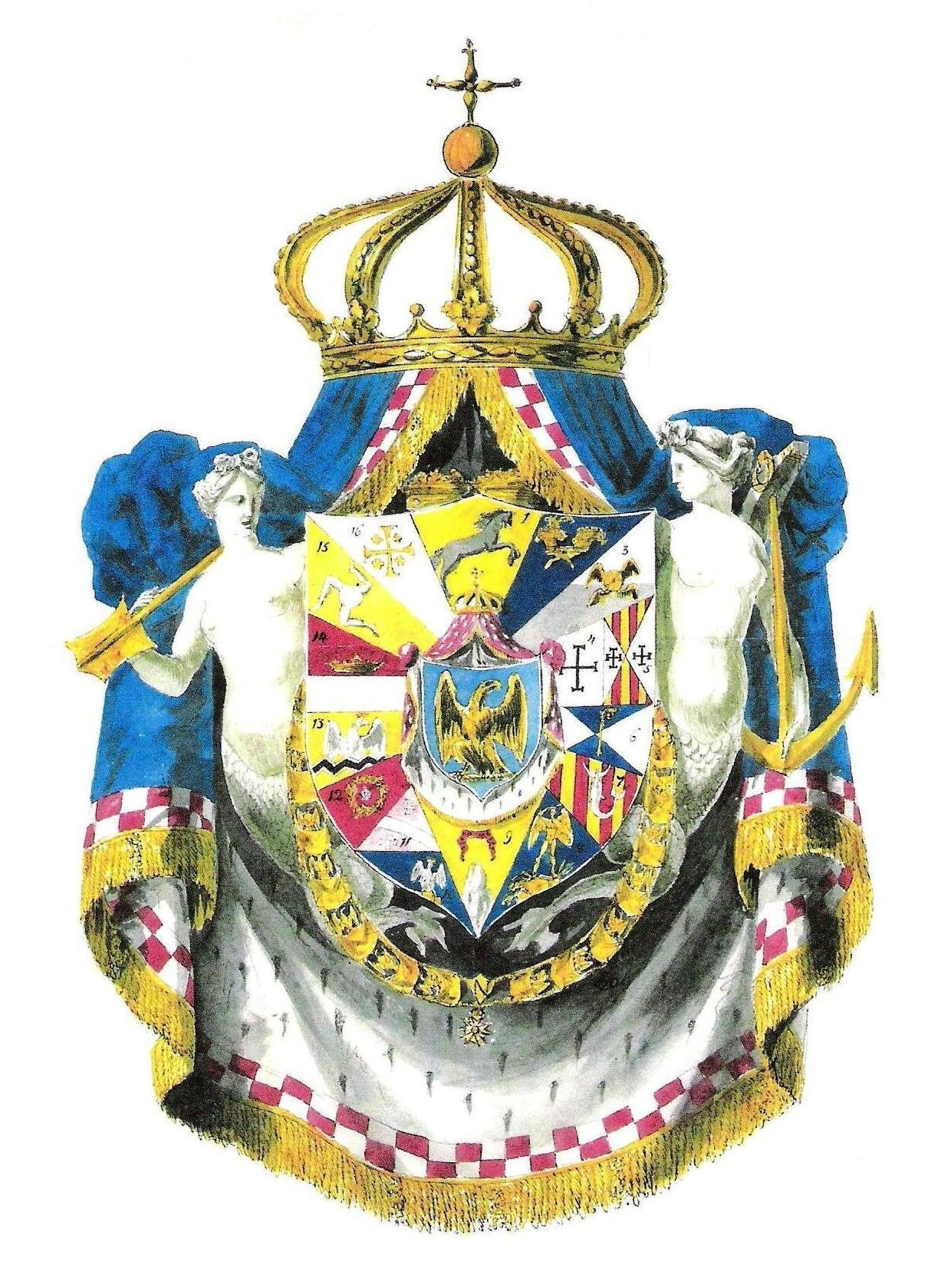 Stemma del Regno di Napoli sotto Giuseppe Bonaparte. L'immagine rappresenta lo stemma ufficiale del Regno di Napoli come stabilito da Giuseppe Bonaparte (Re di Napoli 1806-1808). Lo stemma rappresenta tutte le regioni facenti parte del regno (è compresa anche la Sicilia, di fatto tenuta dalla dinastia Borbonica), sovrastate, al centro dallo stemma imperiale di Napoleone Bonaparte. Si differenzia dal susseguente stemma di Gioacchino Murat (1808-1815) per la sola differenza che il secondo aggiunge, al centro, le insegne di Grande Ammiraglio dell'Impero (un'ancora a due bracci dietro lo stemma Napoleonico). L'immagine, di pubblico dominio, è stata ottenuta per scansione da un antico testo dall'utente:Emmeauerre, con piccole modifiche 'grafiche' da parte dell'autore (Utente:Retaggio).